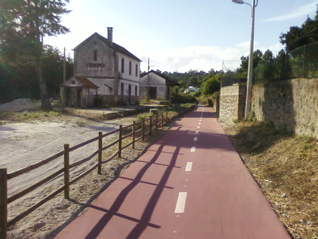 Ciclovia sobre leito da Linha do Dão, junto à estação de Figueiró.